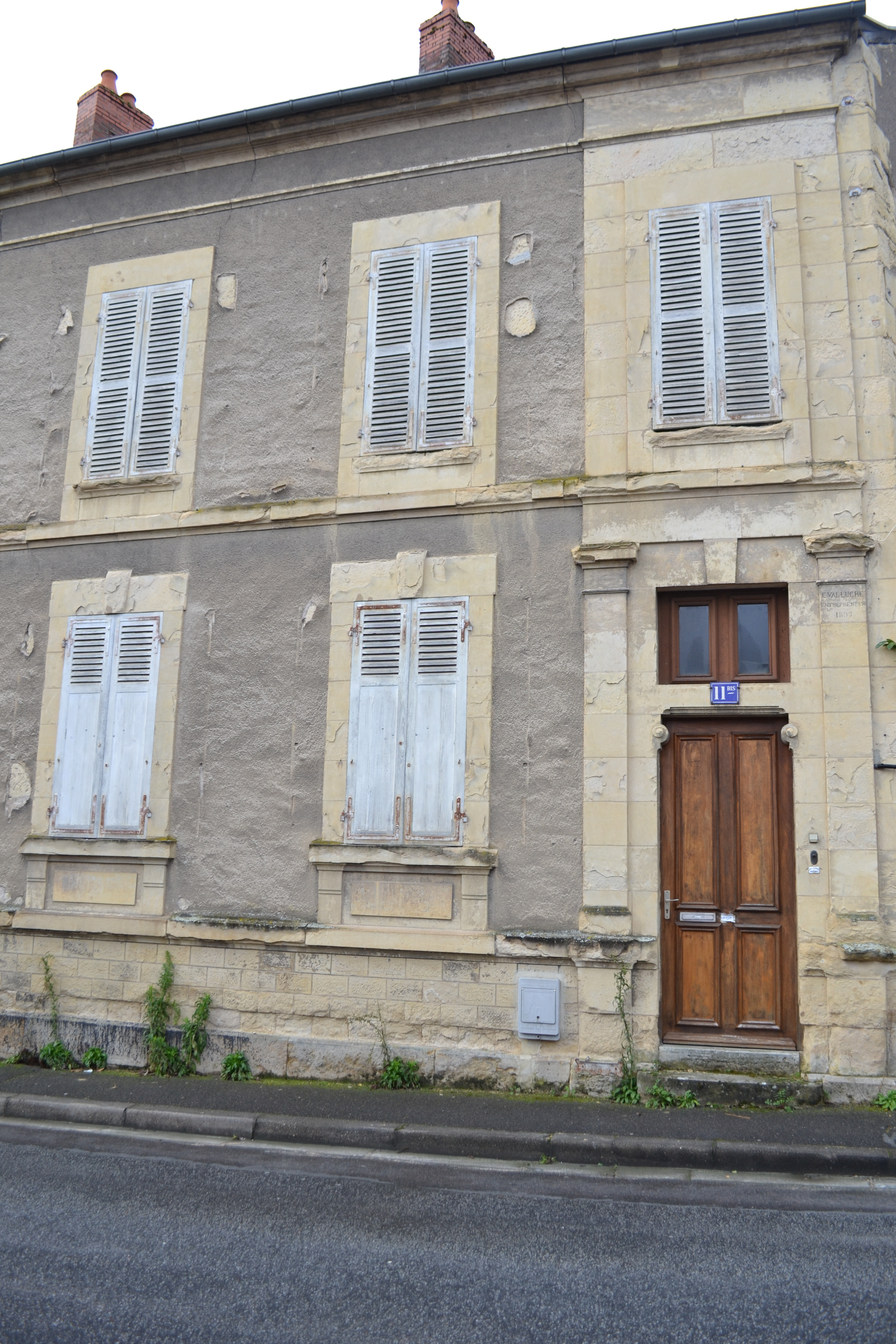 Siège de la Société académique du Nivernais, 11bis, rue Jean-Baptiste Gresset, Nevers. Dernière demeure de Lucien Guéneau, fondateur de la Société.